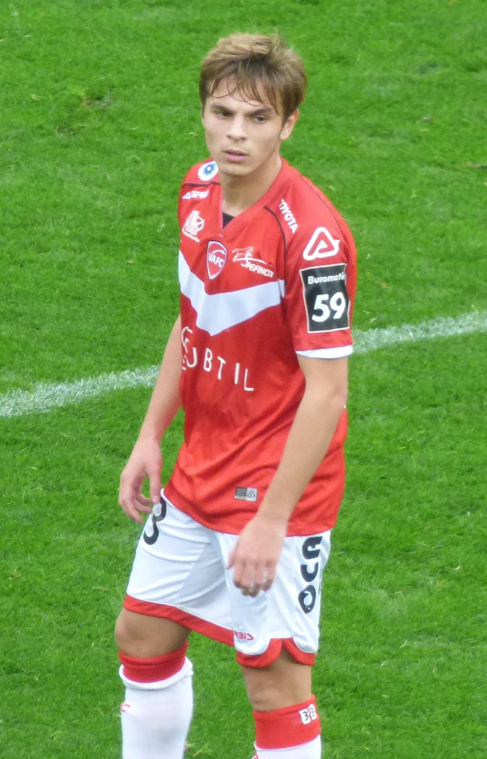 Gaëtan Arib lors du match Valenciennes FC / RC Lens, comptant pour la quatorzième journée du championnat de France de Ligue 2 2018-2019, le 10 novembre 2018, au Stade du Hainaut.